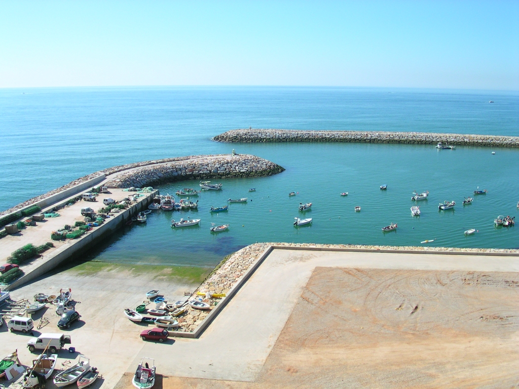 Albufeira Valter Jacinto